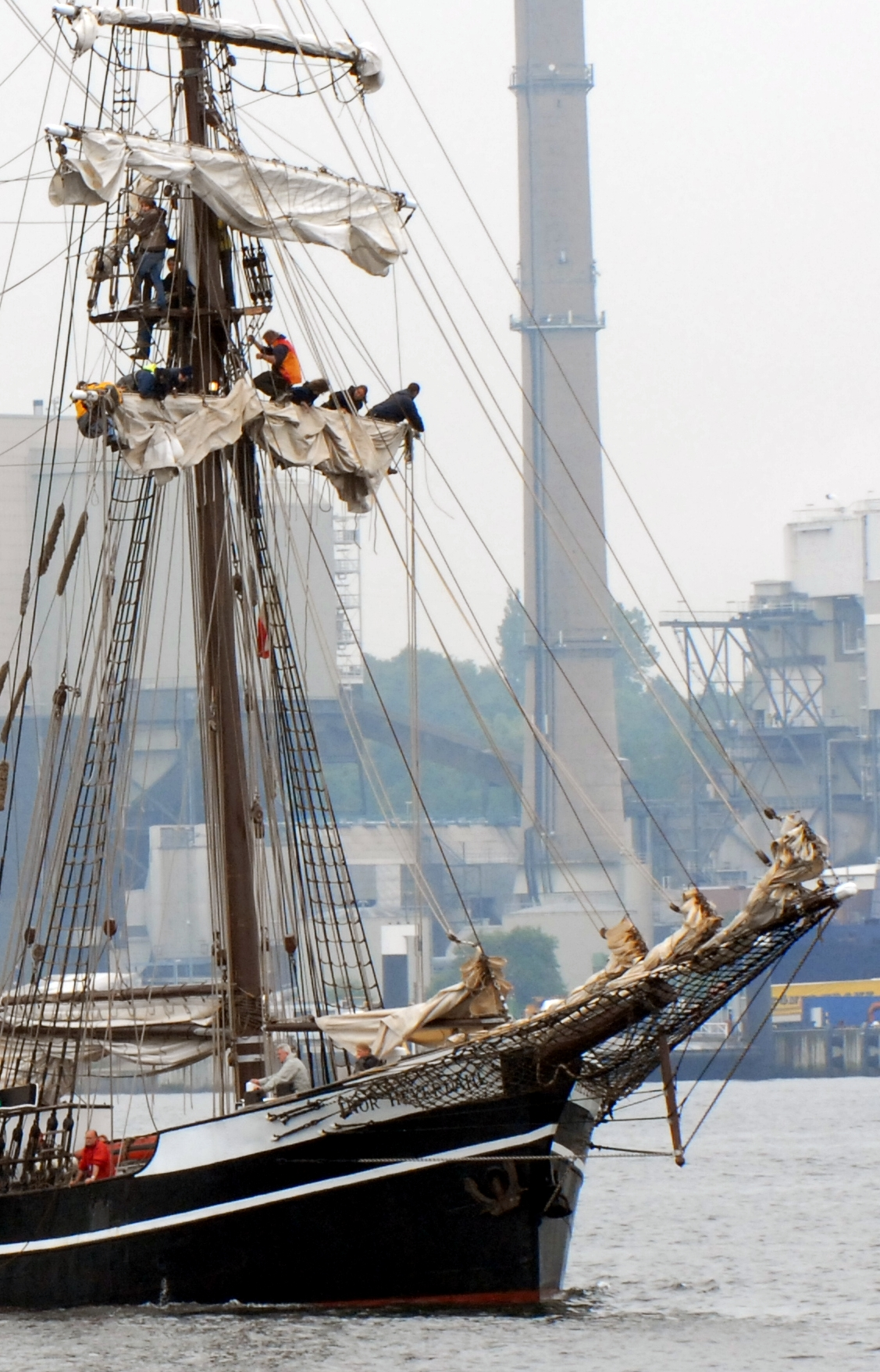 Bergen der Segel auf der Thor Heyerdahl während der Kieler Woche 2007